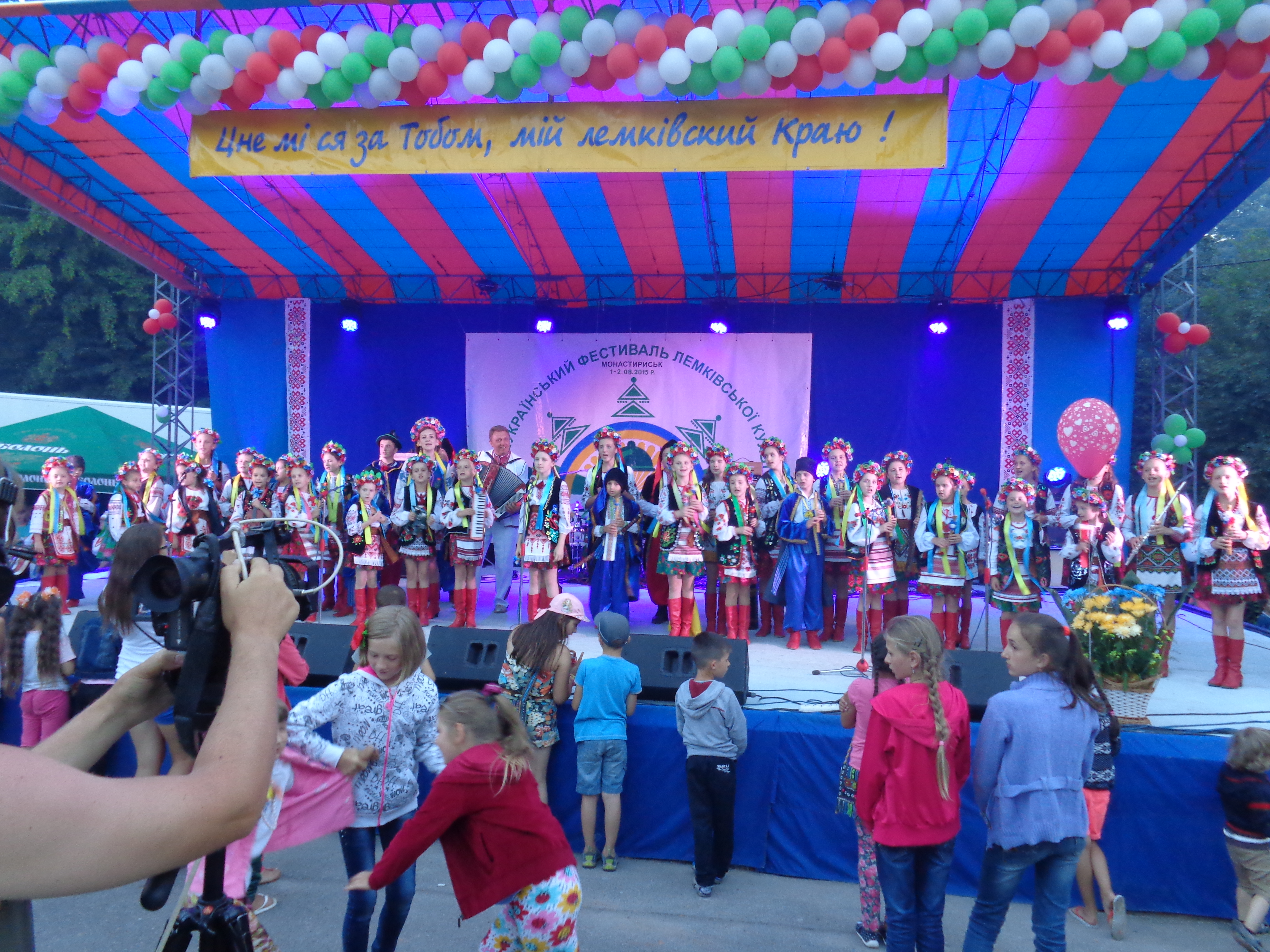 Фестиваль лемківської культури "Дзвони Лемківщини".